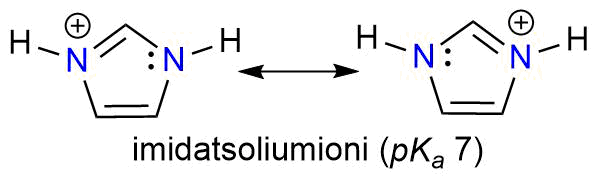 Imidatsoliumionin resonanssirakenteet